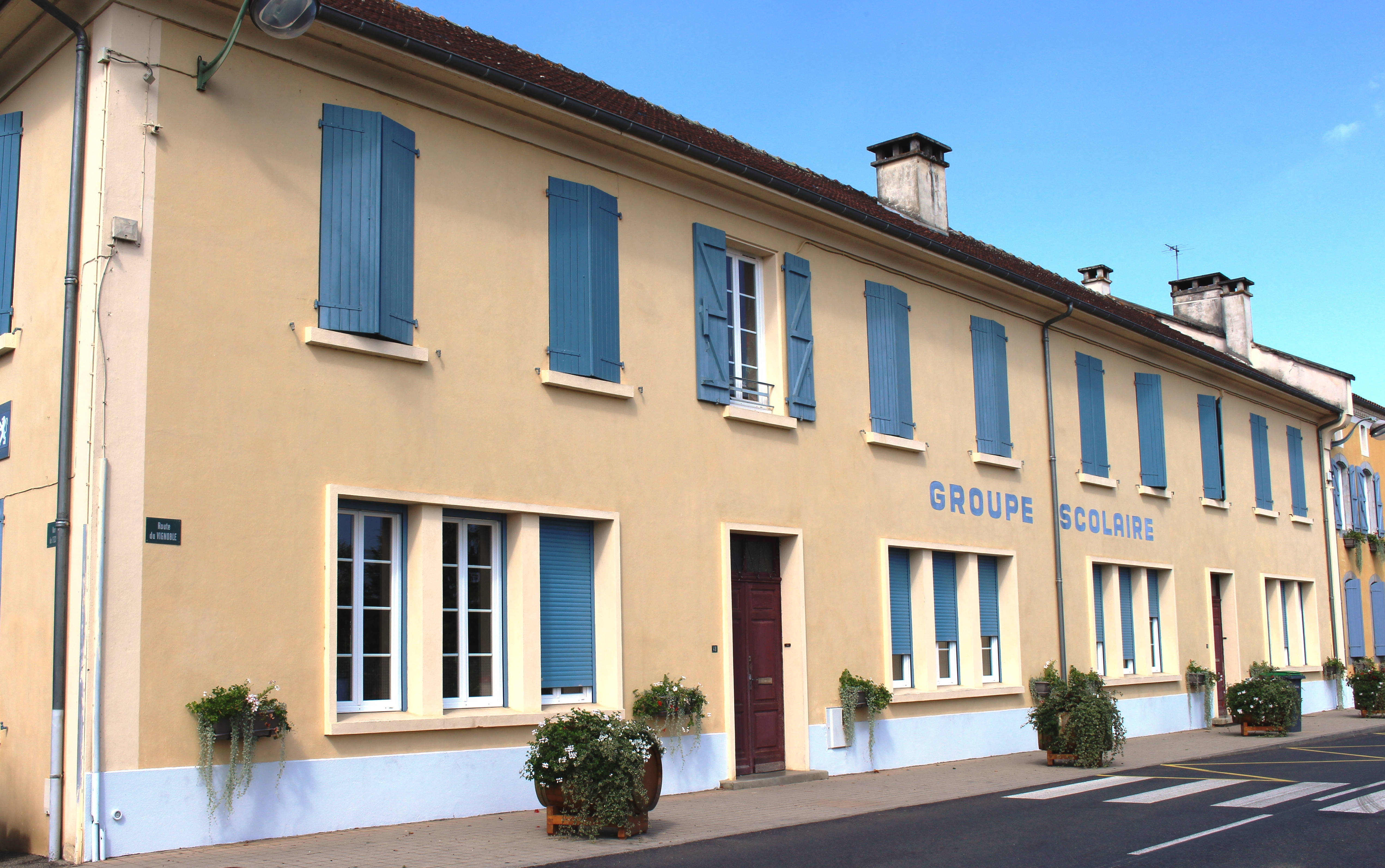 École de Madiran (Hautes-Pyrénées)